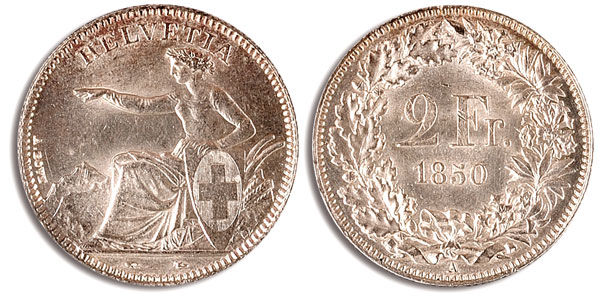 Erste Version der Zwei Franken Münze mit sitzender Helvetia, Schweiz 1850